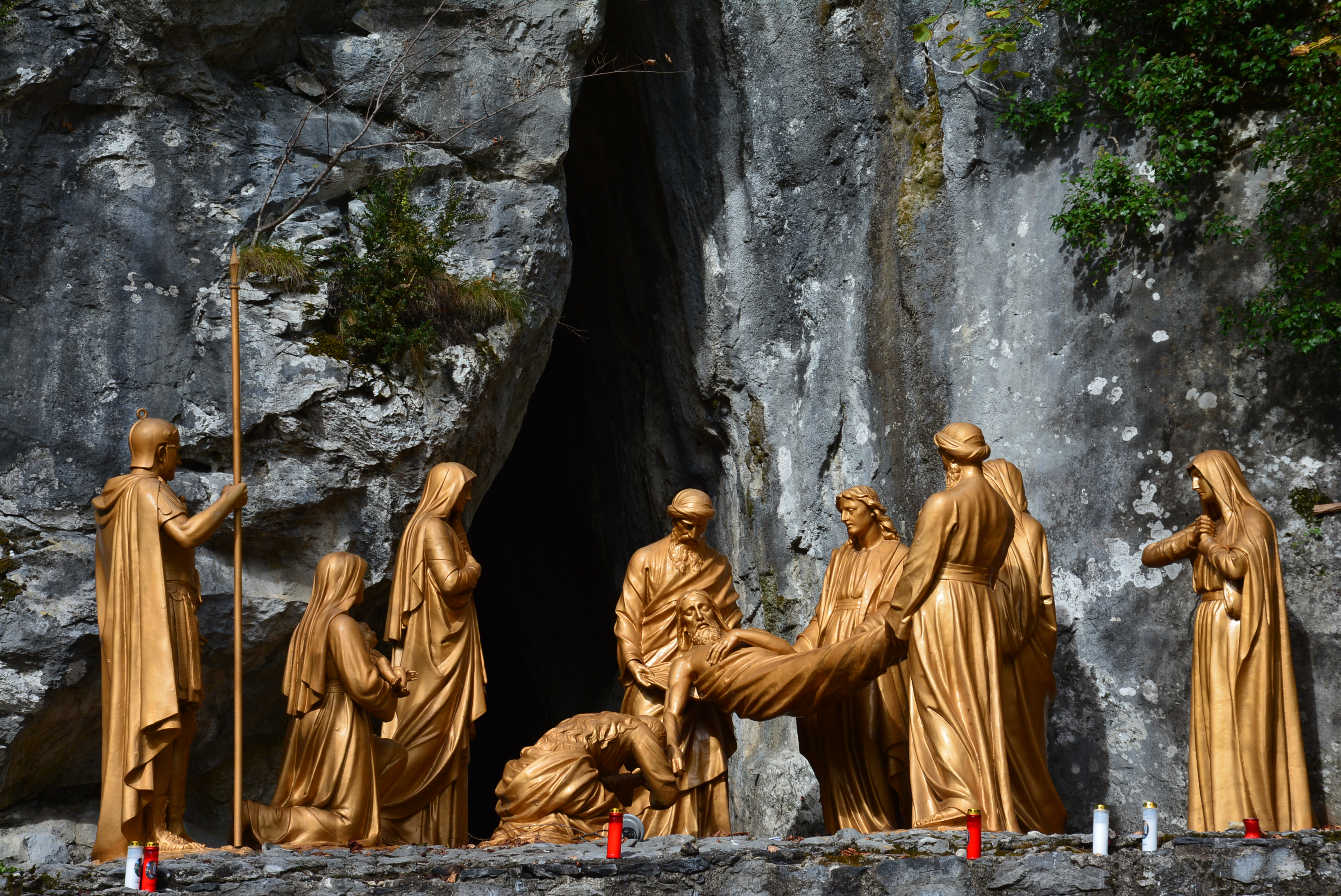 Via Crucis di Lourdes